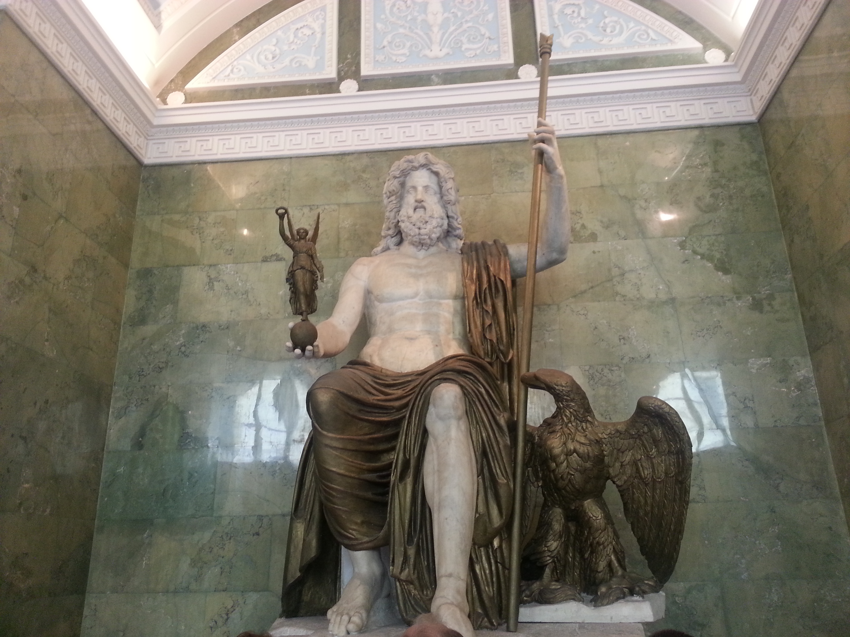 Ermitaj Müzesi'nde sergilenen Zeus Heykeli.